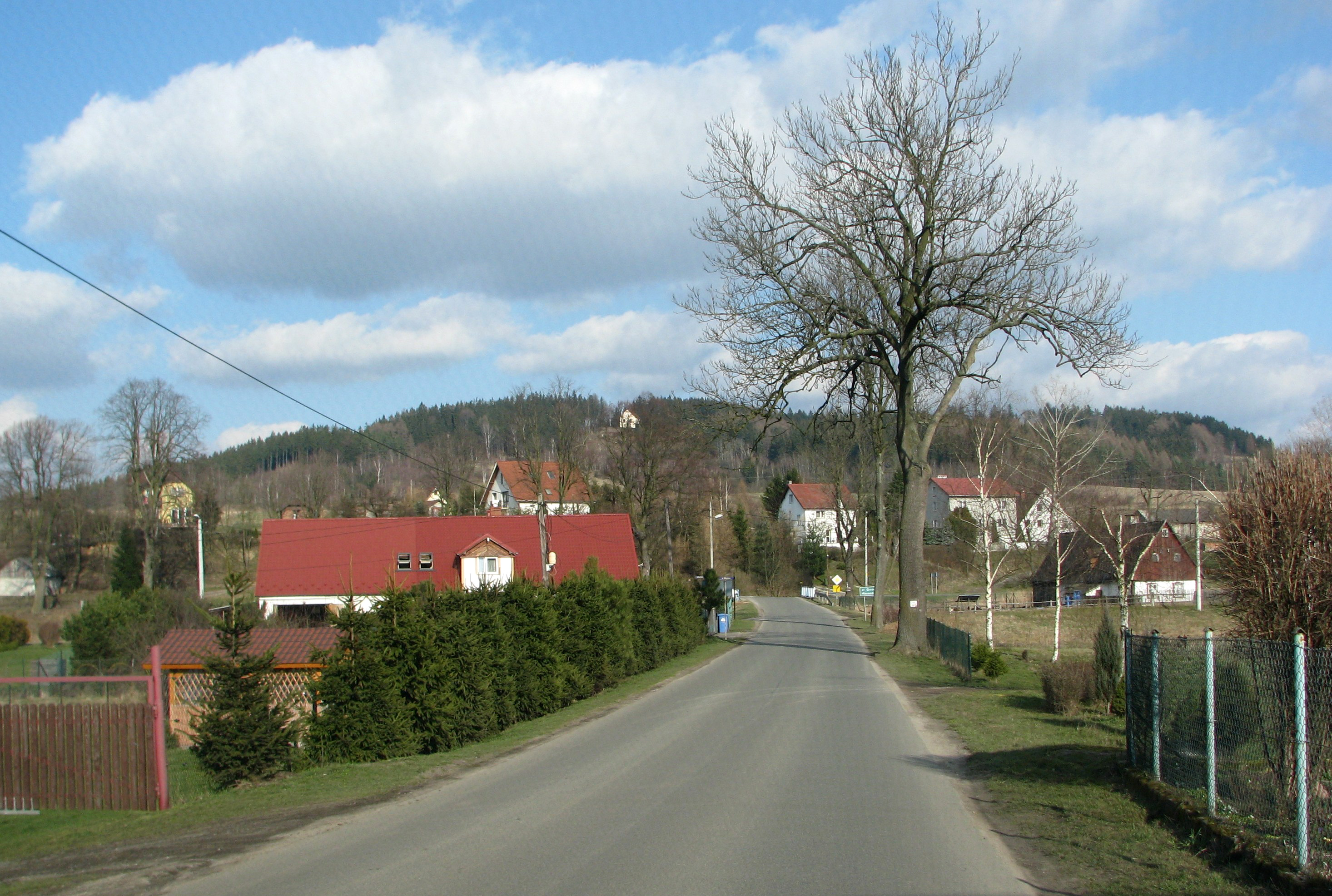 Góra Św. Anny wiosną 2016